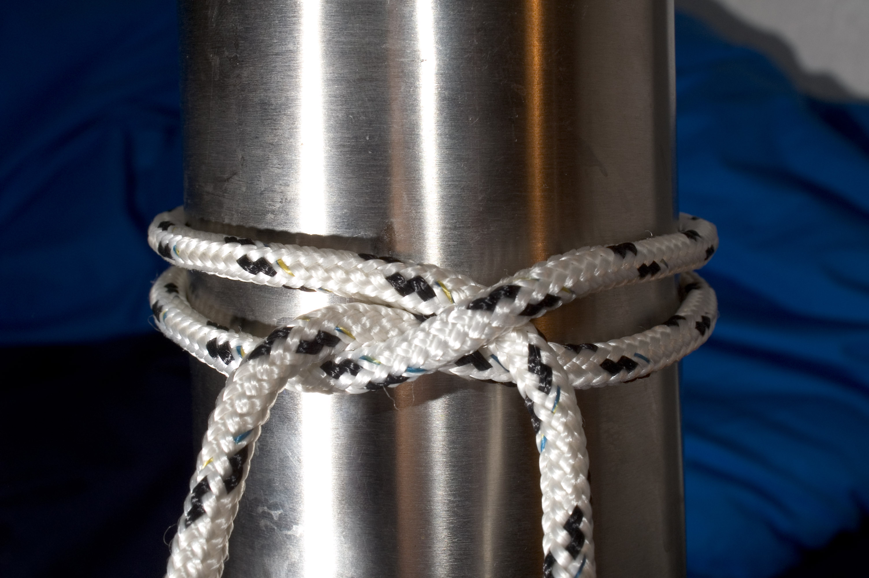 Nœud de cabestan Author: Fanny Schertzer